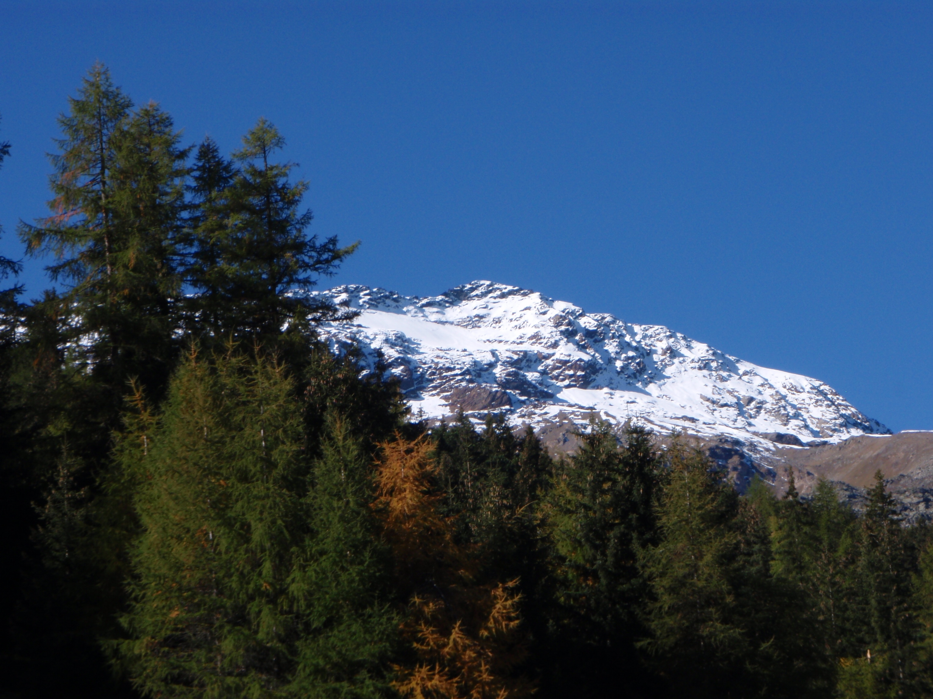 prima neve sul Sobretta vista da Santa Caterina Valfurva